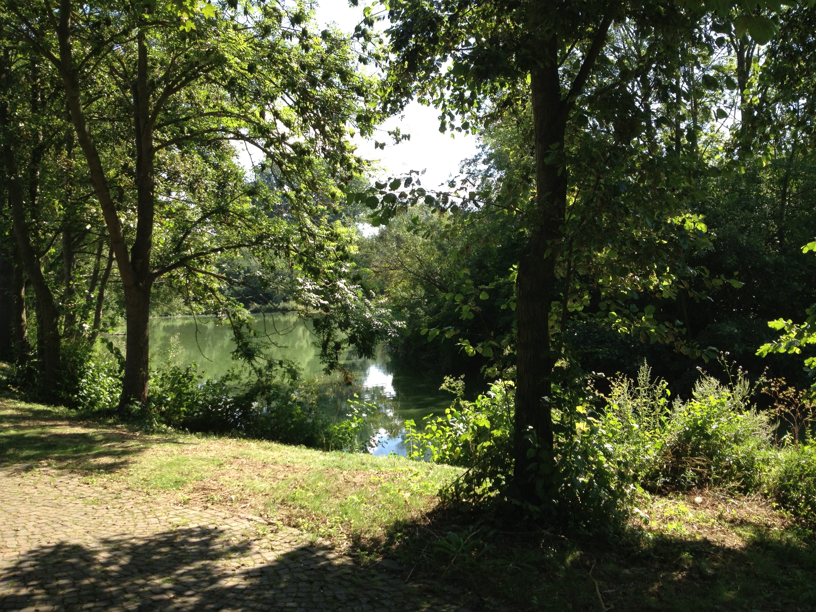 Der Leiselsee im Leiselpark in Baunatal